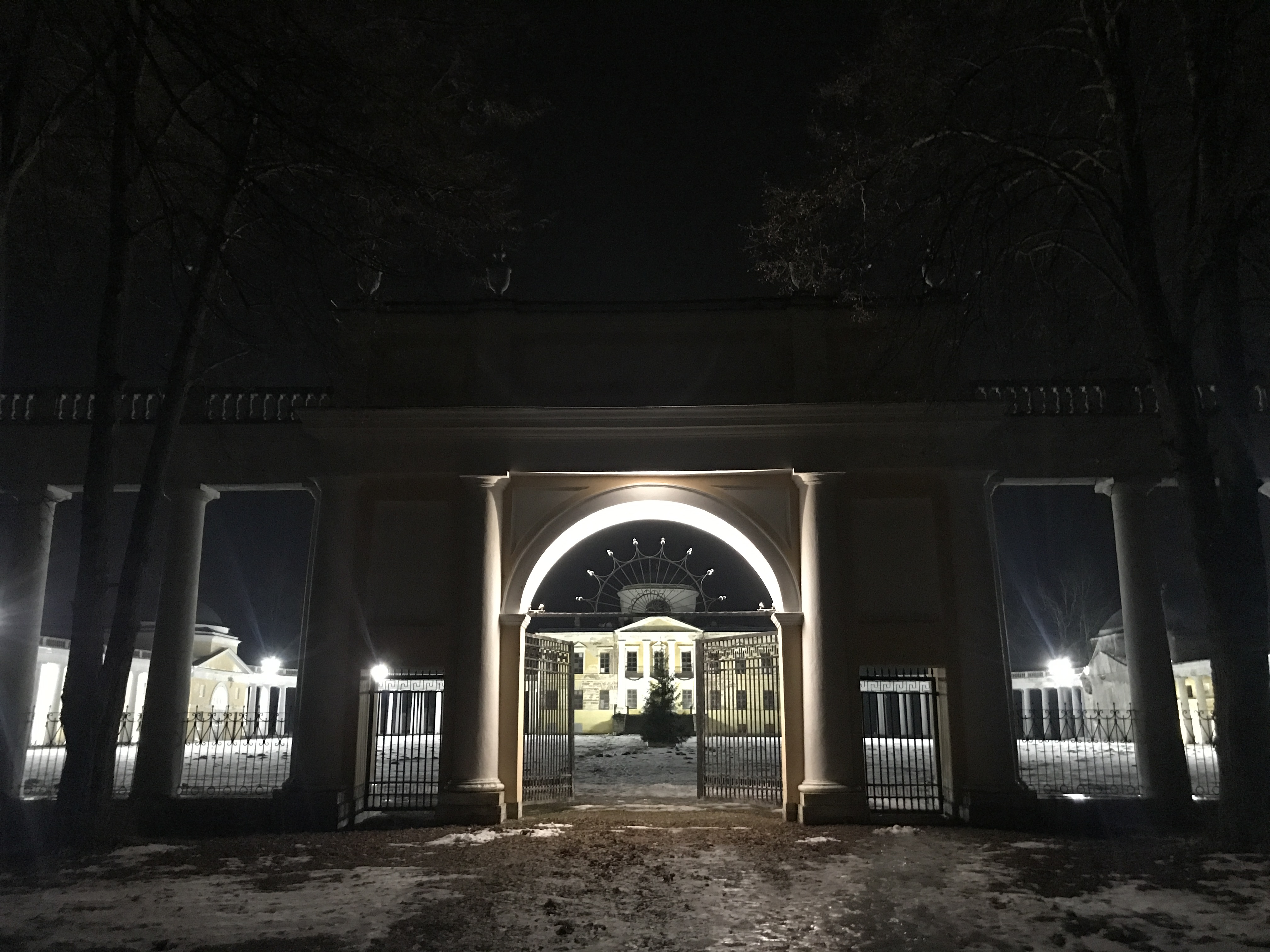 Вид на парадные ворота